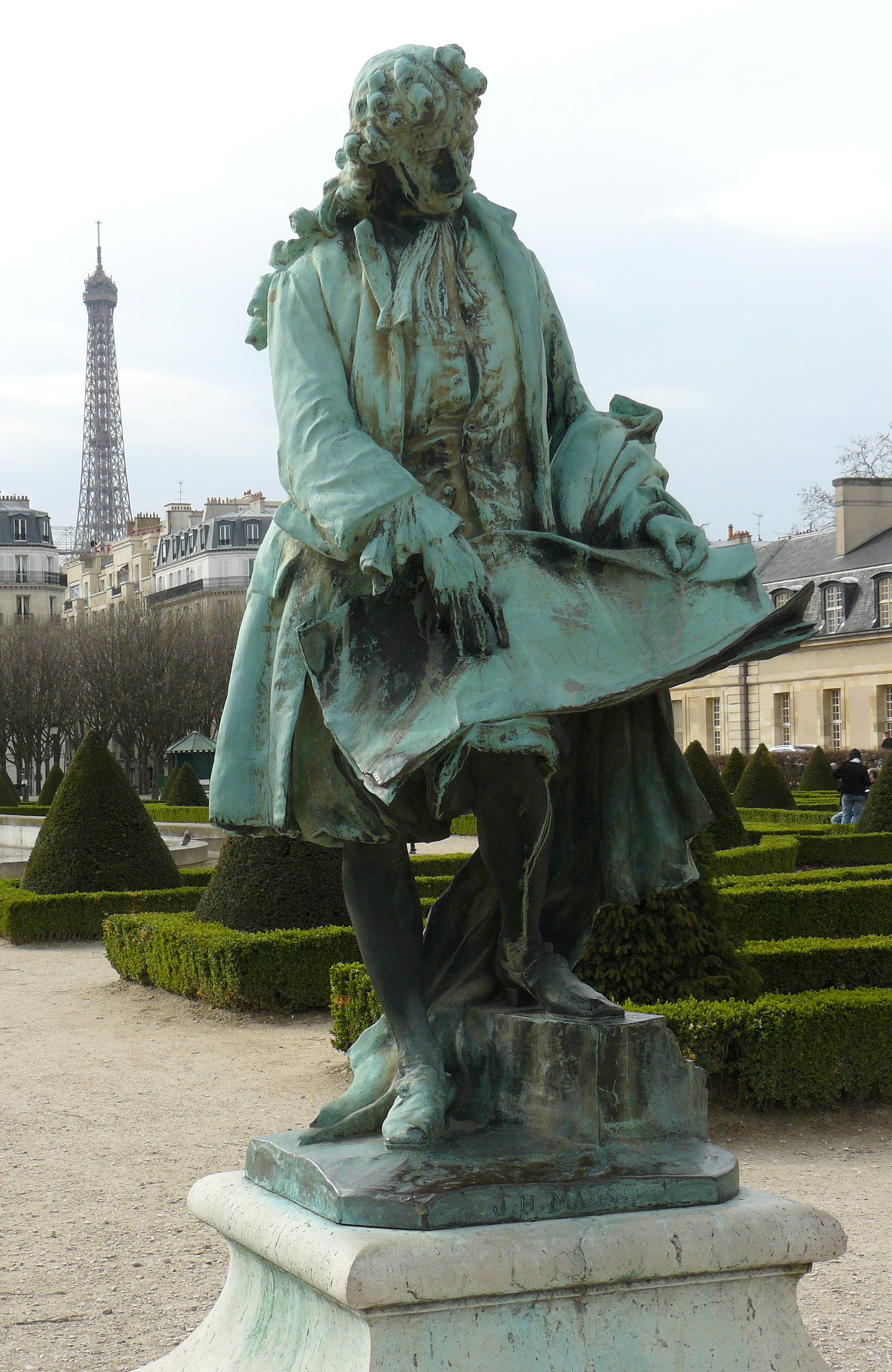 Statue de Jules Harduin-Mansart par Ernest Henri Dubois (1863-1930) - bronze, jardin de l'intendant, les Invalides, Paris (7e arrond.)